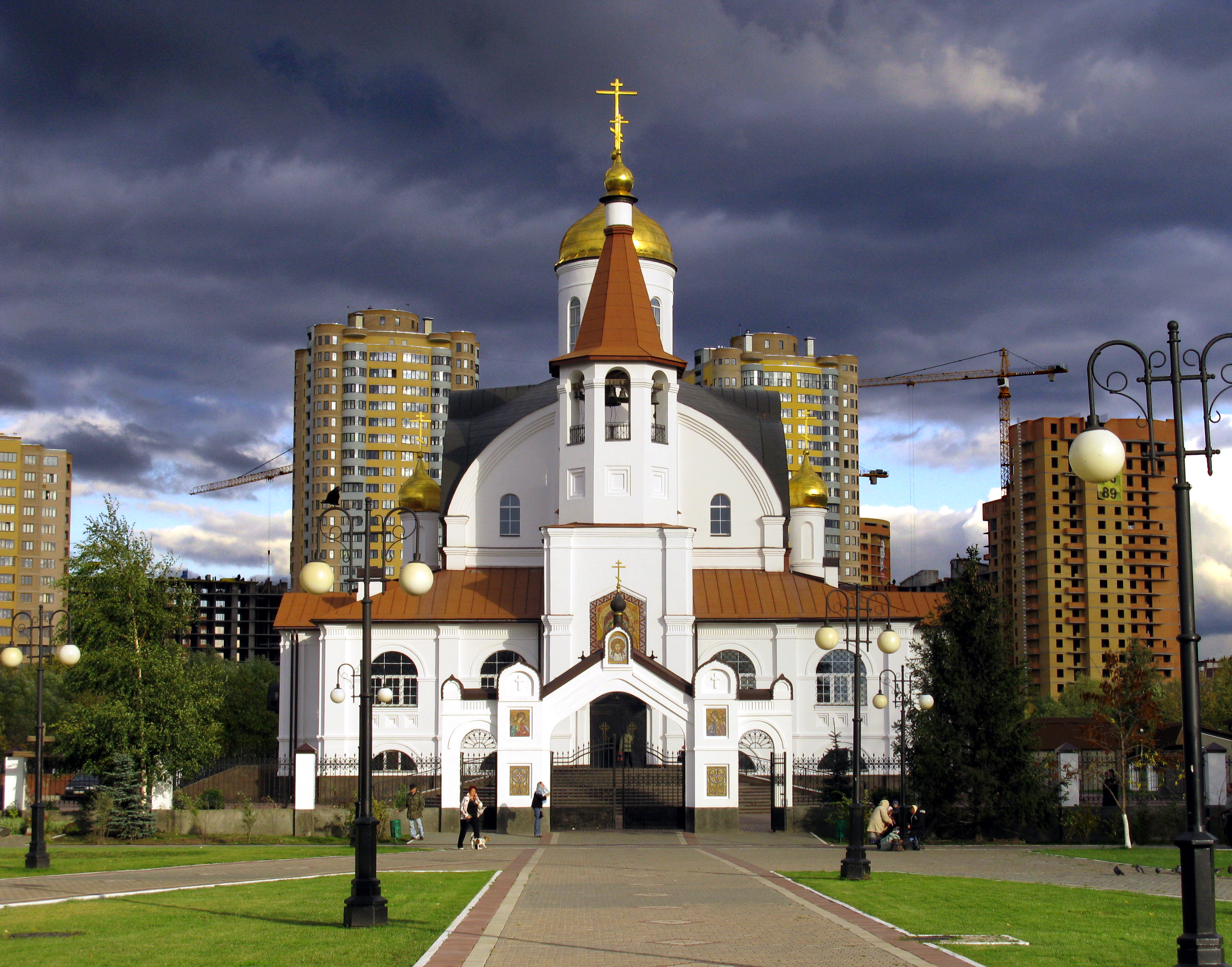 Церковь Казанской иконы Божией Матери (Реутов)